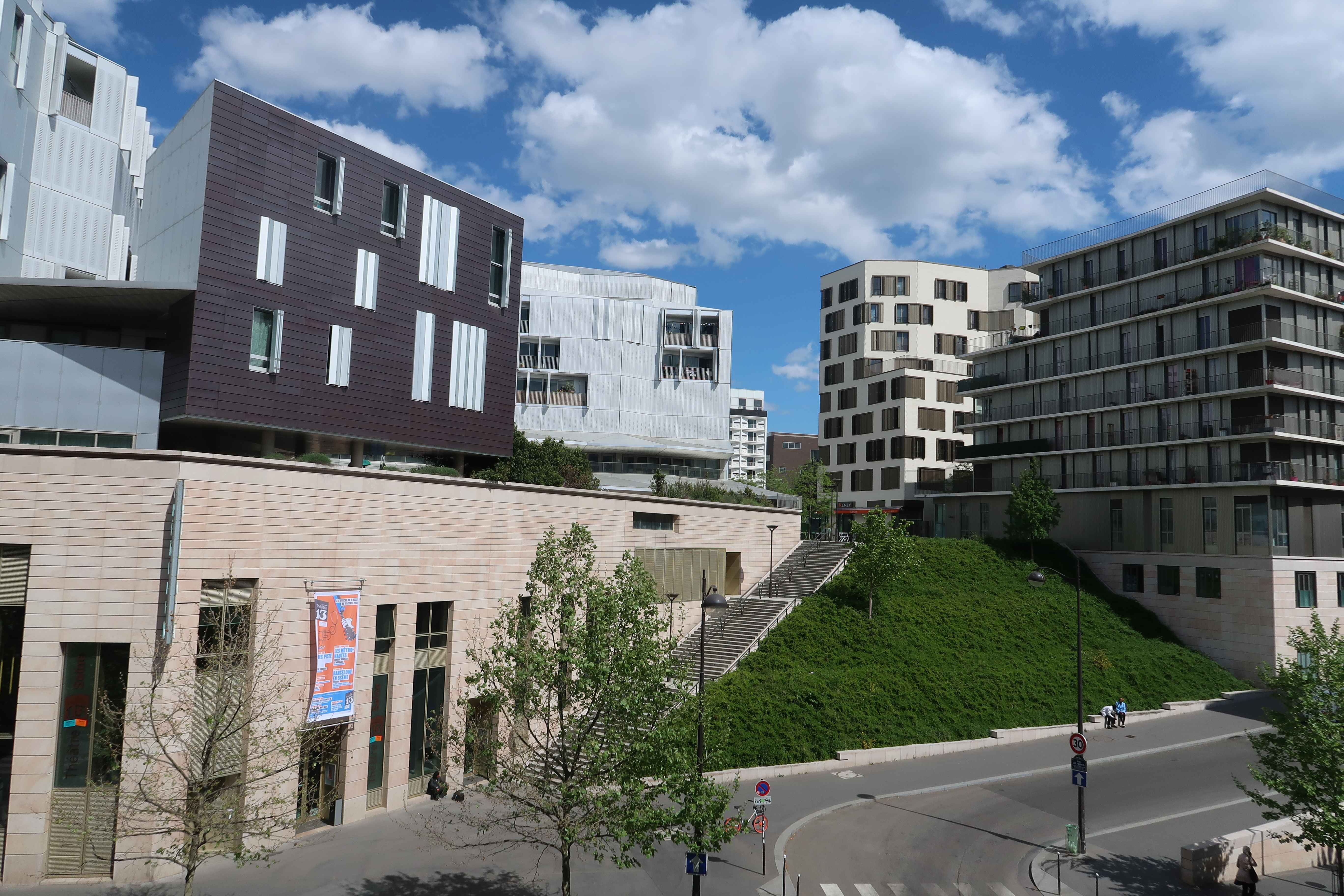 Rue Jacques-Lacan (Paris, 13e).